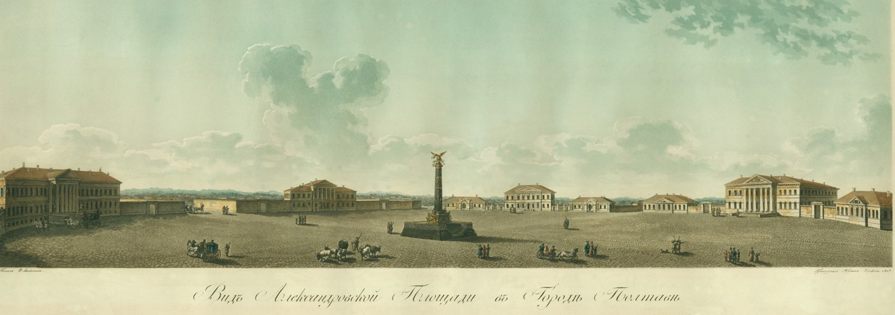 Вигляд Олександрівського майдану в Полтаві.